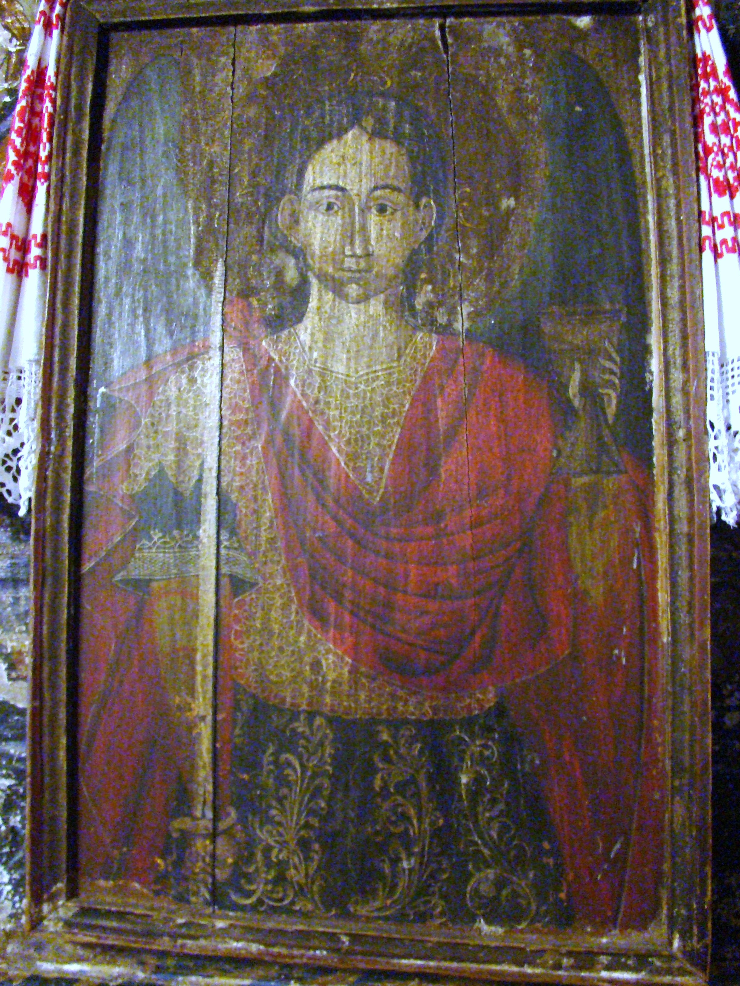 Arhanghelul Mihail la Biserica de lemn „Sfântul Nicolae” din Ciubăncuța